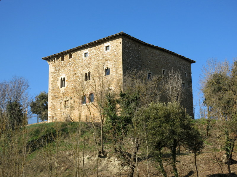 castell de Mont-rodon